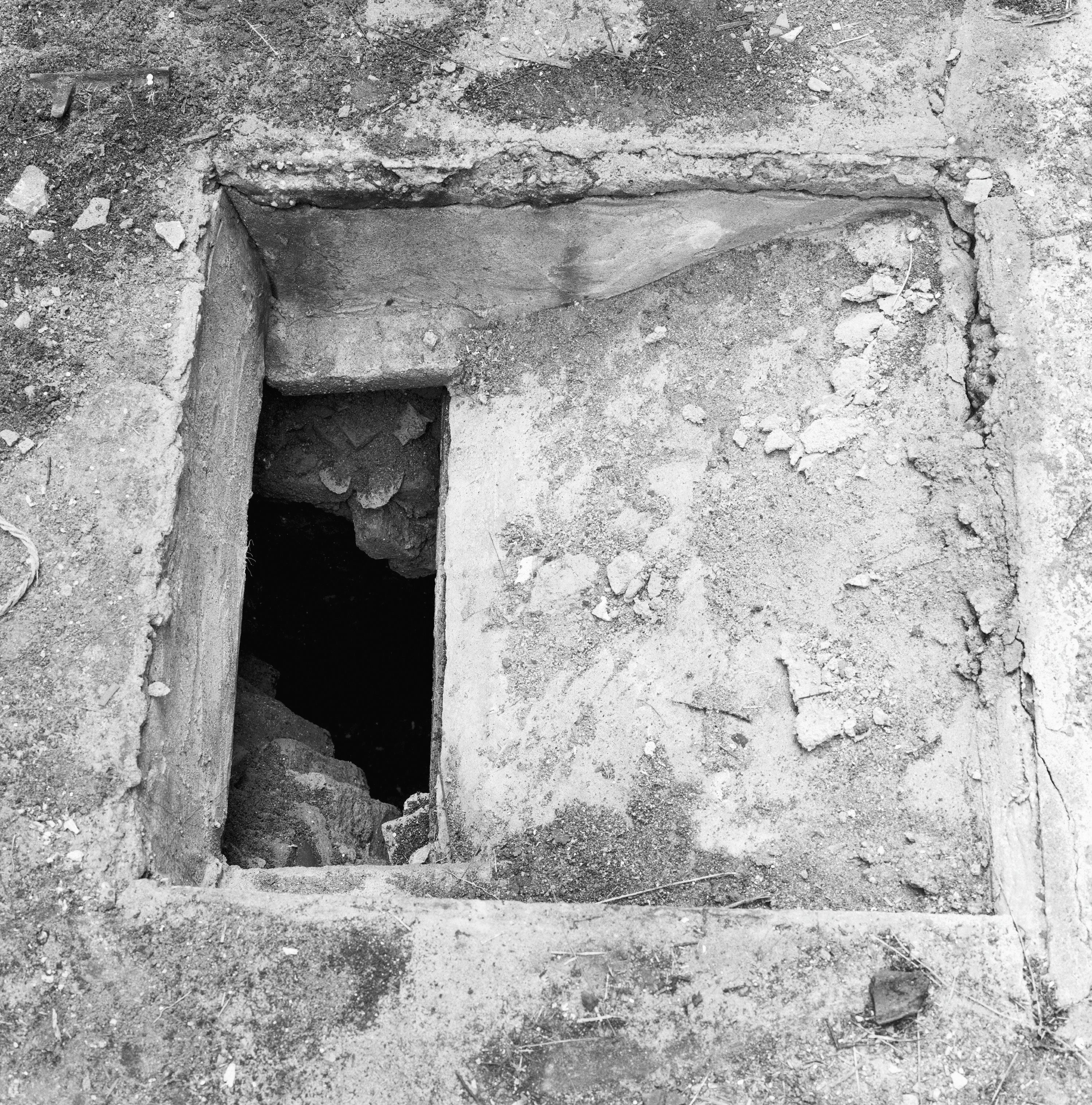 Interieur, beerput